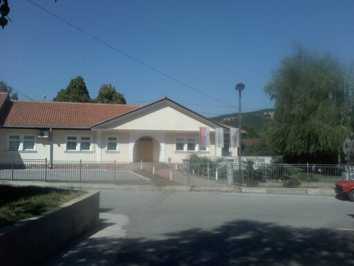 Rektorat Univerziteta u Prištini sa privremenim sedištem u Kosovskoj Mitrovici.